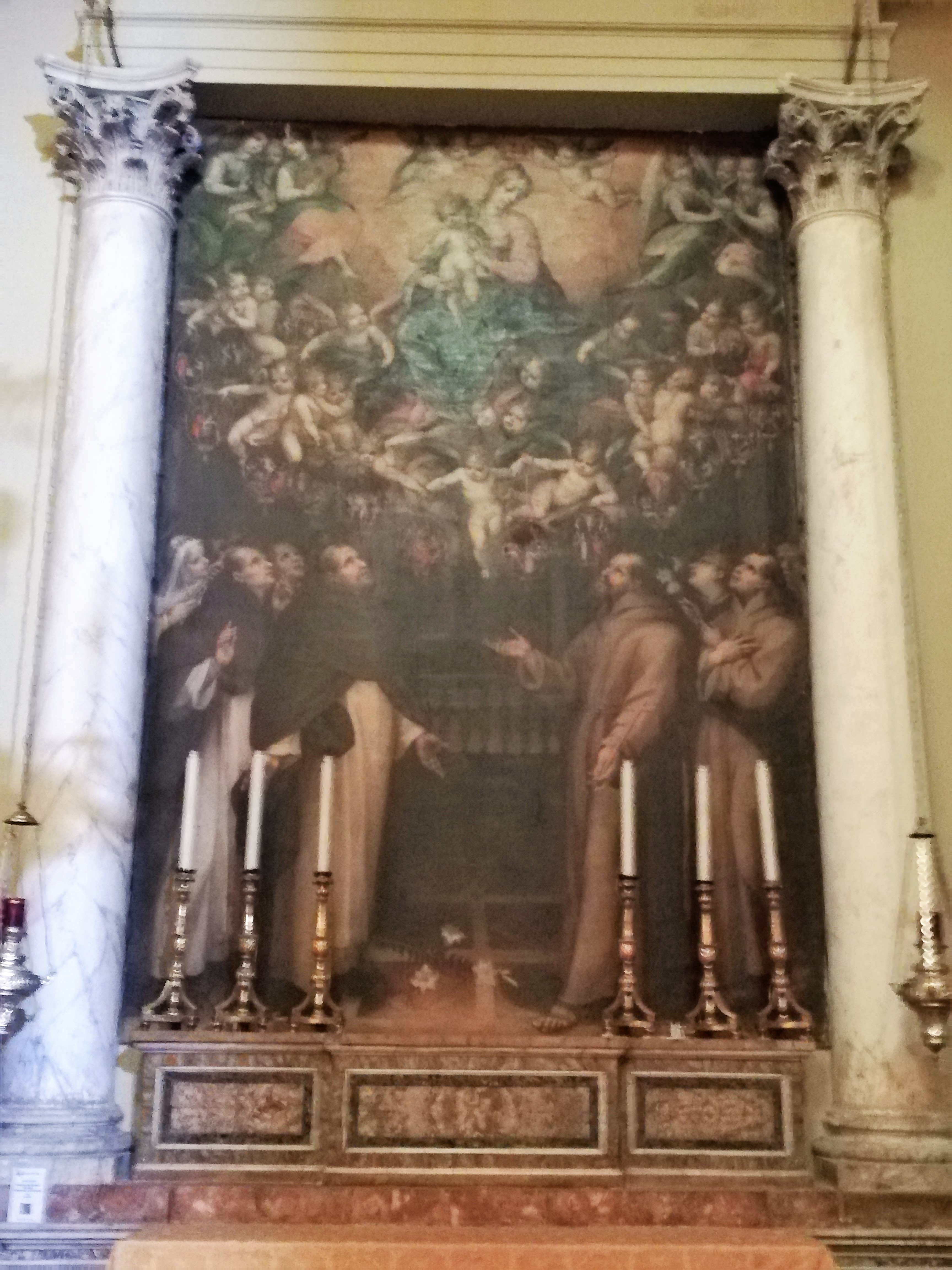 Vergine del Rosario ritratta con esponenti dell'Ordine domenicano e francescano: a sinistra Santa Caterina da Siena e San Domenico di Guzmán, a destra San Francesco d'Assisi e Sant'Antonio di Padova, e ancora Sant'Agata, opera del messinese Antonio Catalano il Vecchio. Cappella di Nostra Signora del Rosario.